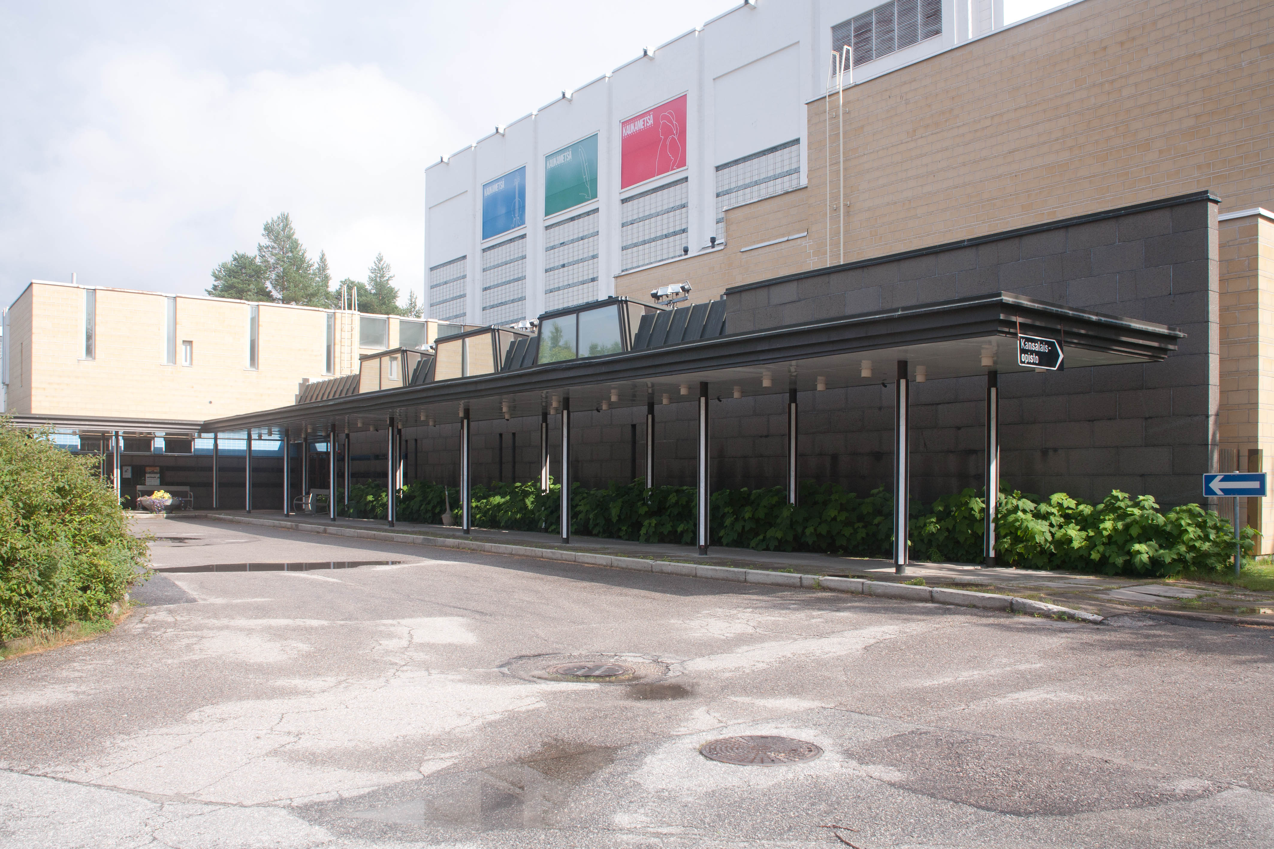 Kouvo & Partanen, 1988-97. Kaukametsä Culture and Congress Centre in Kajaani, Finland. Architects Sinikka Kouvo and Erkki Partanen, 1988.